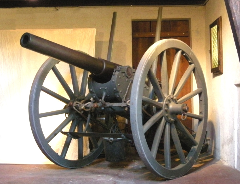 84 Kanone 1879